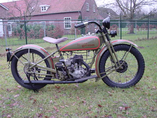 Toestemming van Yesterdays Antique Motorcycles (